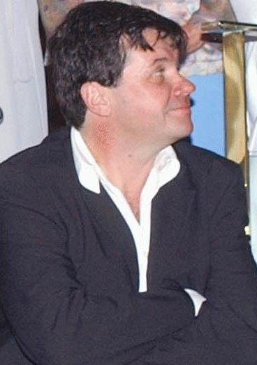 Marcelo Madureira, humorista brasileiro